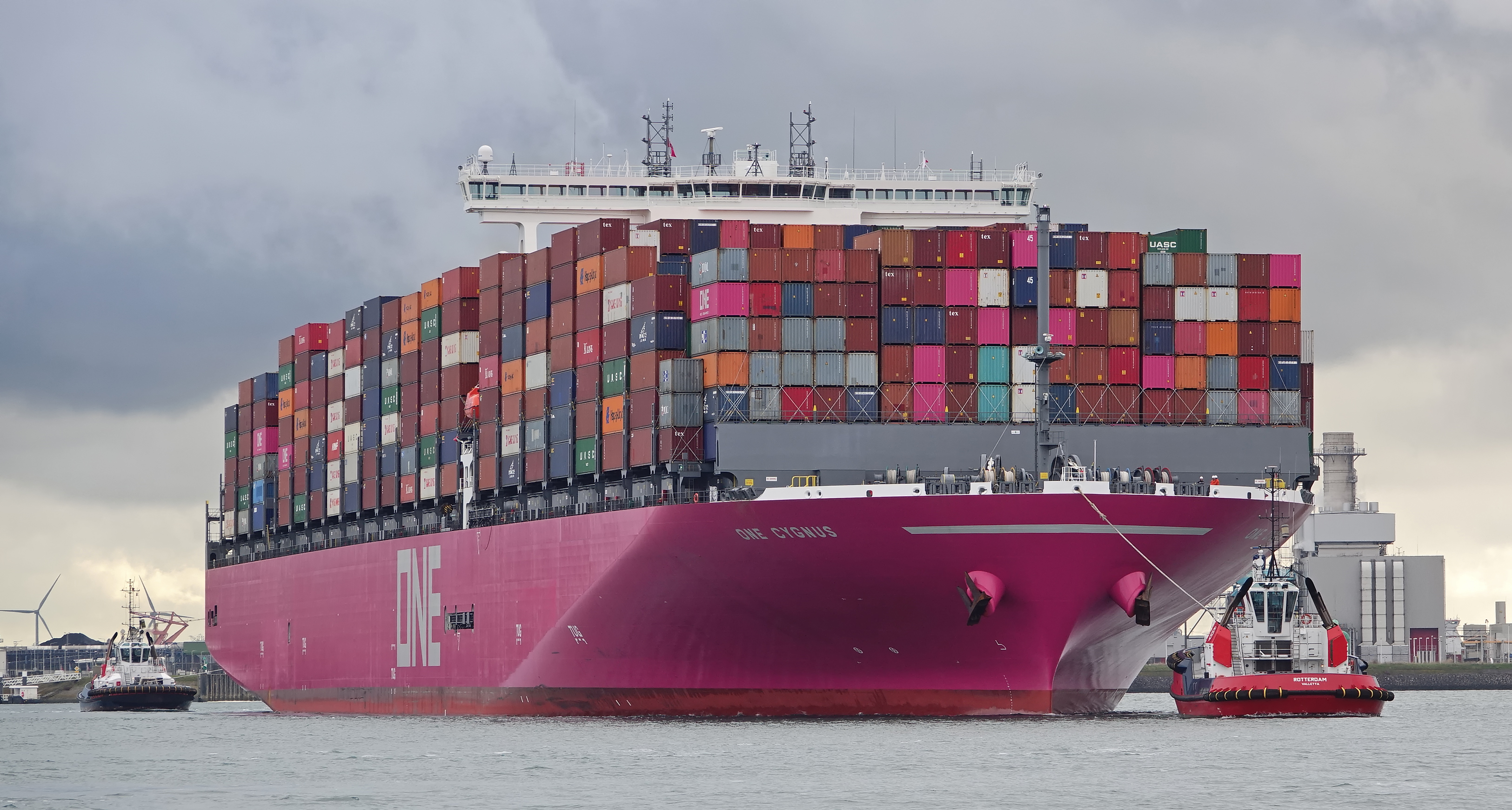 BEAGLE & ROTTERDAM van Boluda Towage assisteerden de ONE CYGNUS naar de RWG terminal in de Pr.Amaliahaven , gezien vanaf DE NIEUWE PRINS